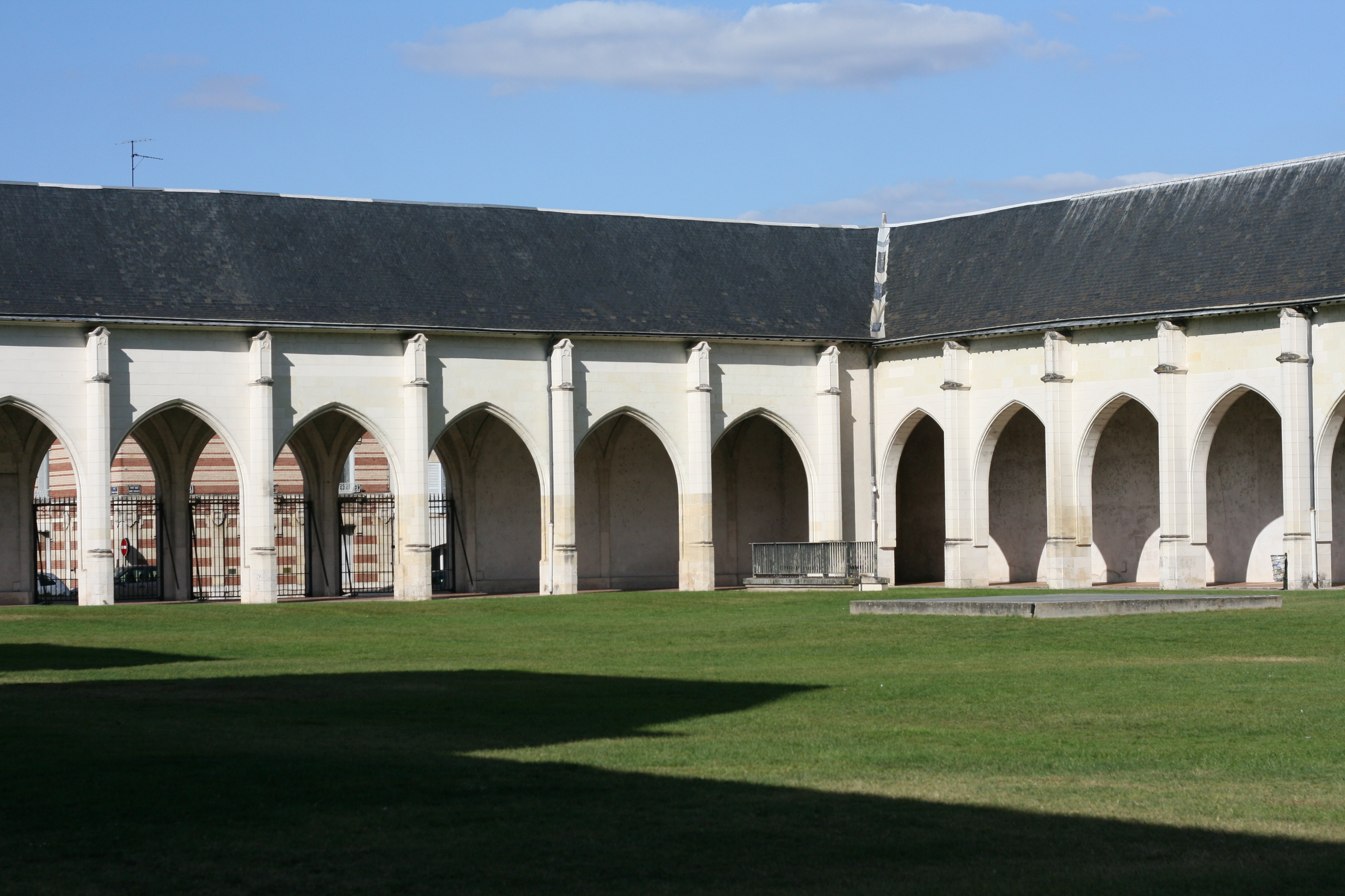 Cloître à Orléans à proximité de la cathédrale Sainte-Croix